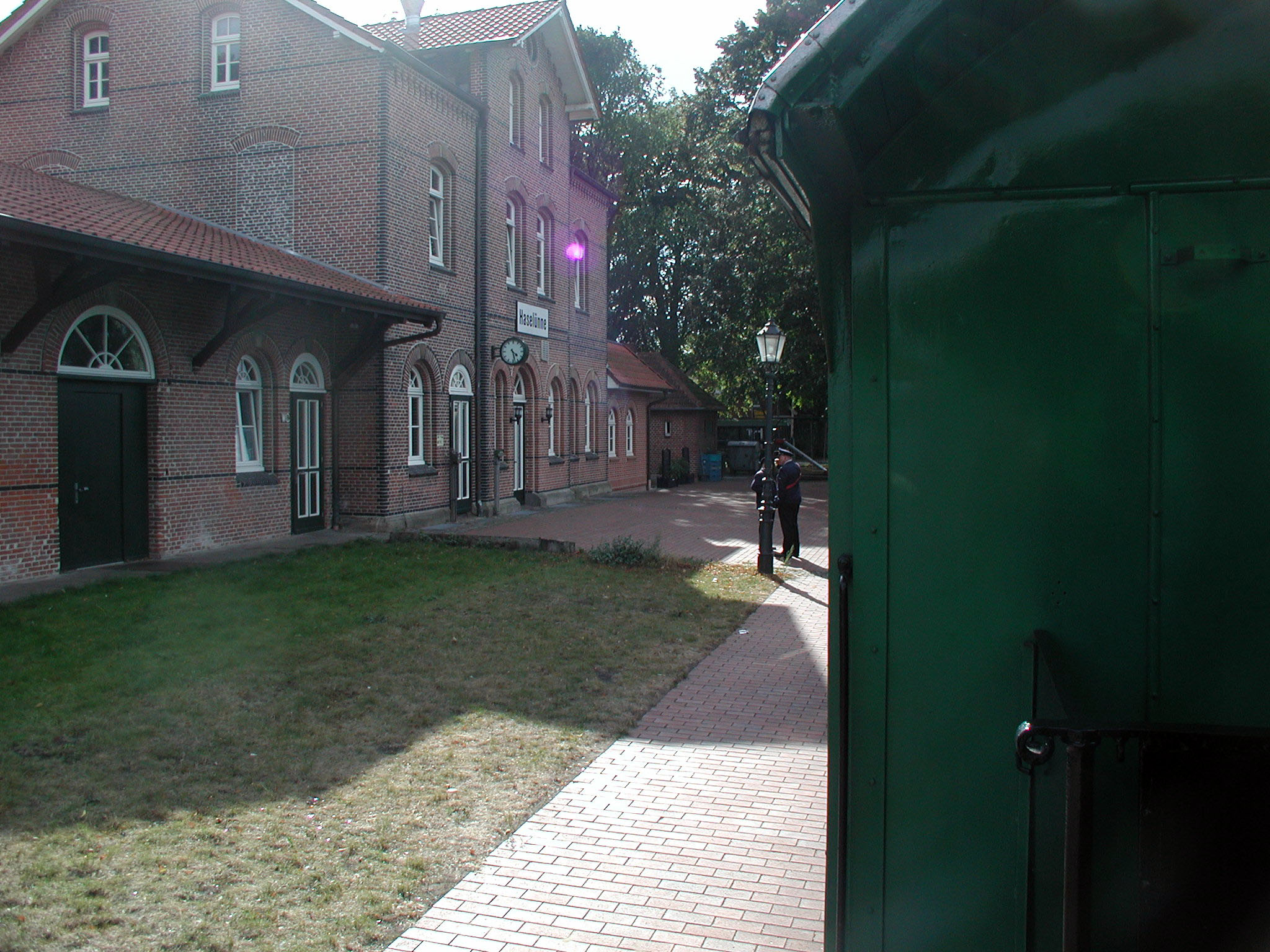 Haselünne, Bahnhof und Historische Eisenbahn